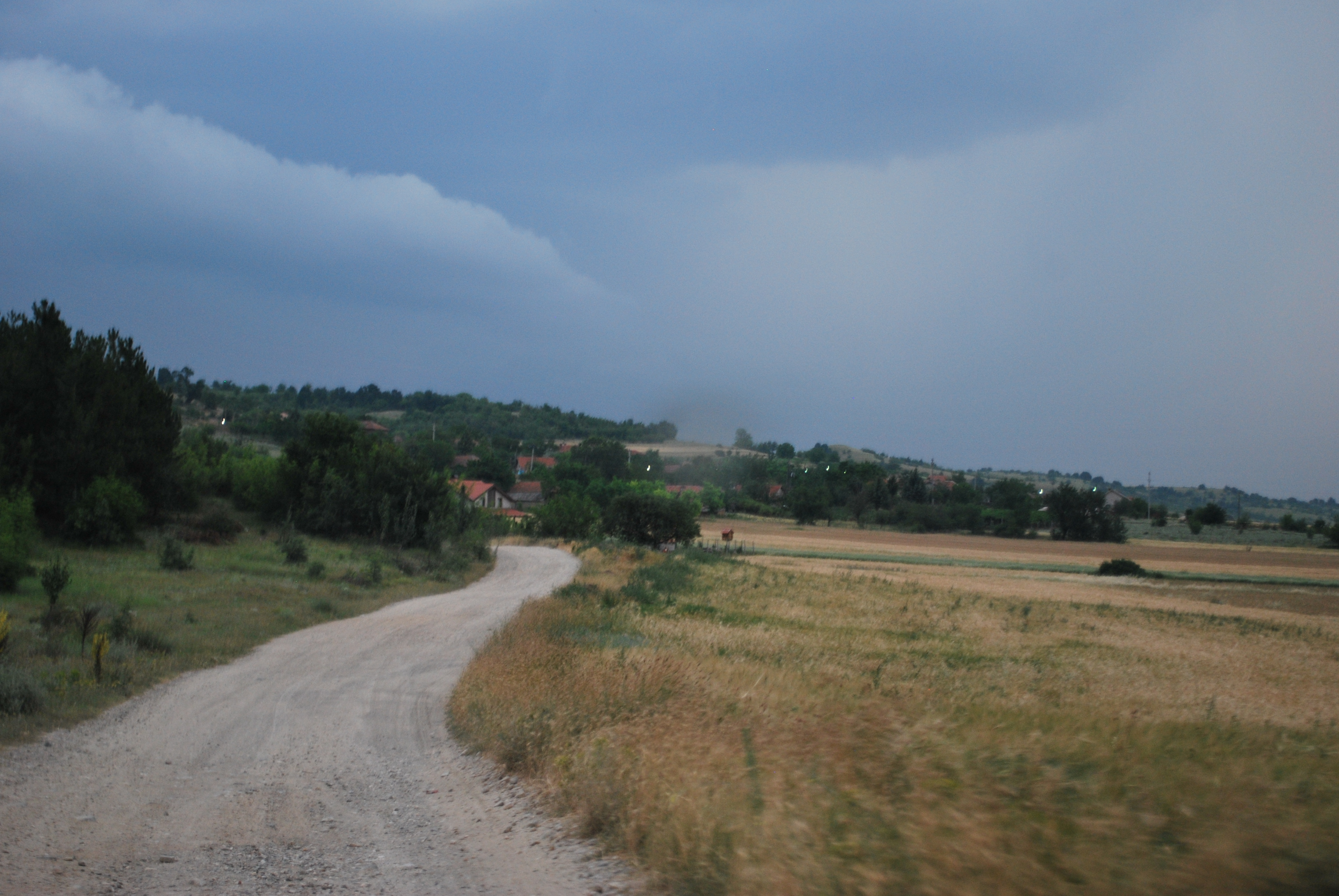 Vak'v, Macedonia